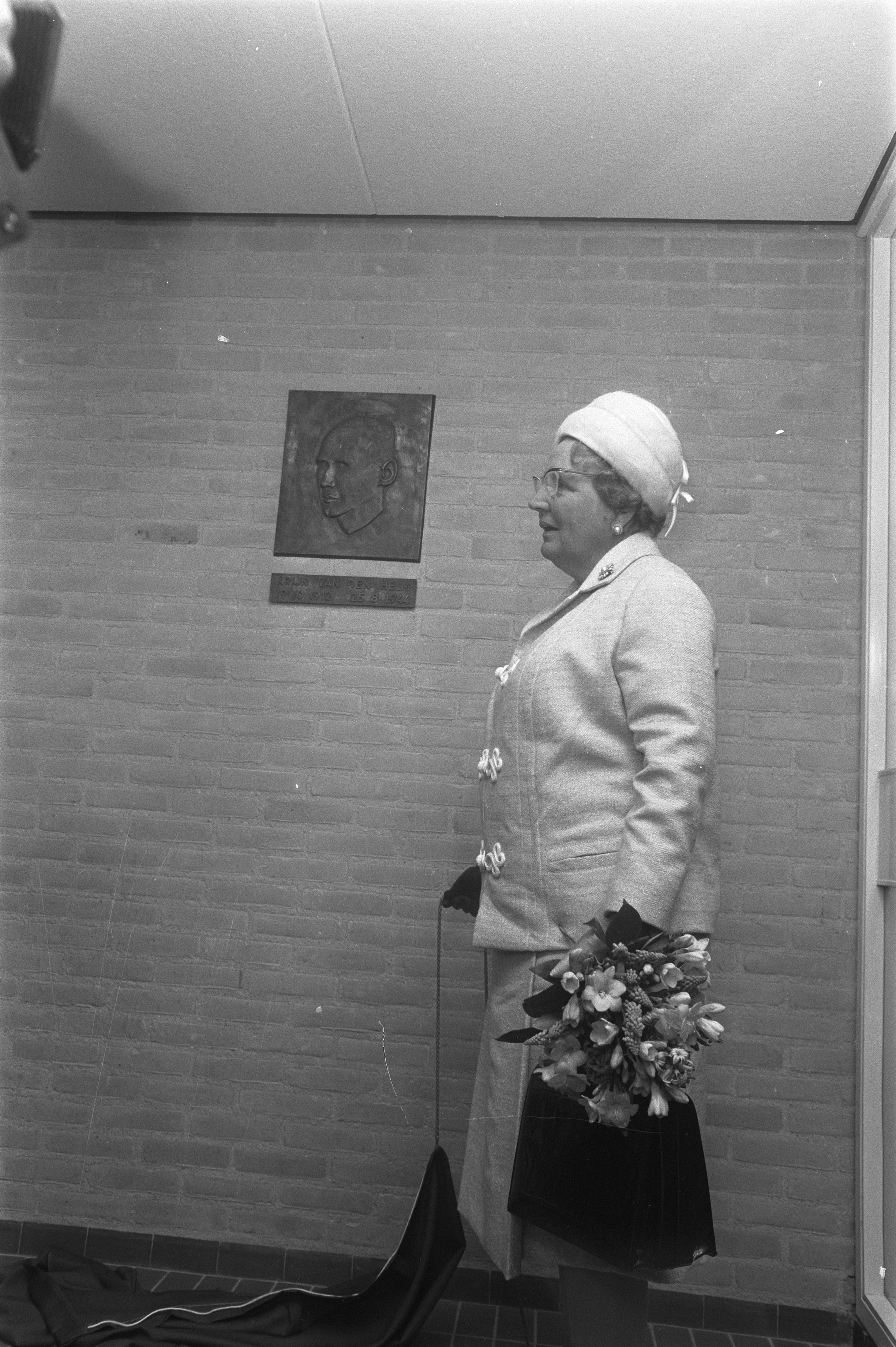 Collectie / Archief : Fotocollectie Anefo Reportage / Serie : Herdenking in Leeuwarden van 25 jaar bevrijding van Friesland in aanwezigheid van koningin Juliana Beschrijving : Koningin Juliana onthult een plaquette ter herinnering aan de verzetsheld Krijn van der Helm (1912-1944) Datum : 15 april 1970 Locatie : Friesland, Leeuwarden Trefwoorden : herdenkingen, koninginnen, oorlogsmonumenten Persoonsnaam : Helm, Krijn van der, Juliana (koningin Nederland) Fotograaf : Fotograaf Onbekend / Anefo, [onbekend] Auteursrechthebbende : Nationaal Archief Materiaalsoort : Negatief (zwart/wit) Nummer archiefinventaris : bekijk toegang 2.24.01.05 Bestanddeelnummer : 923-4450